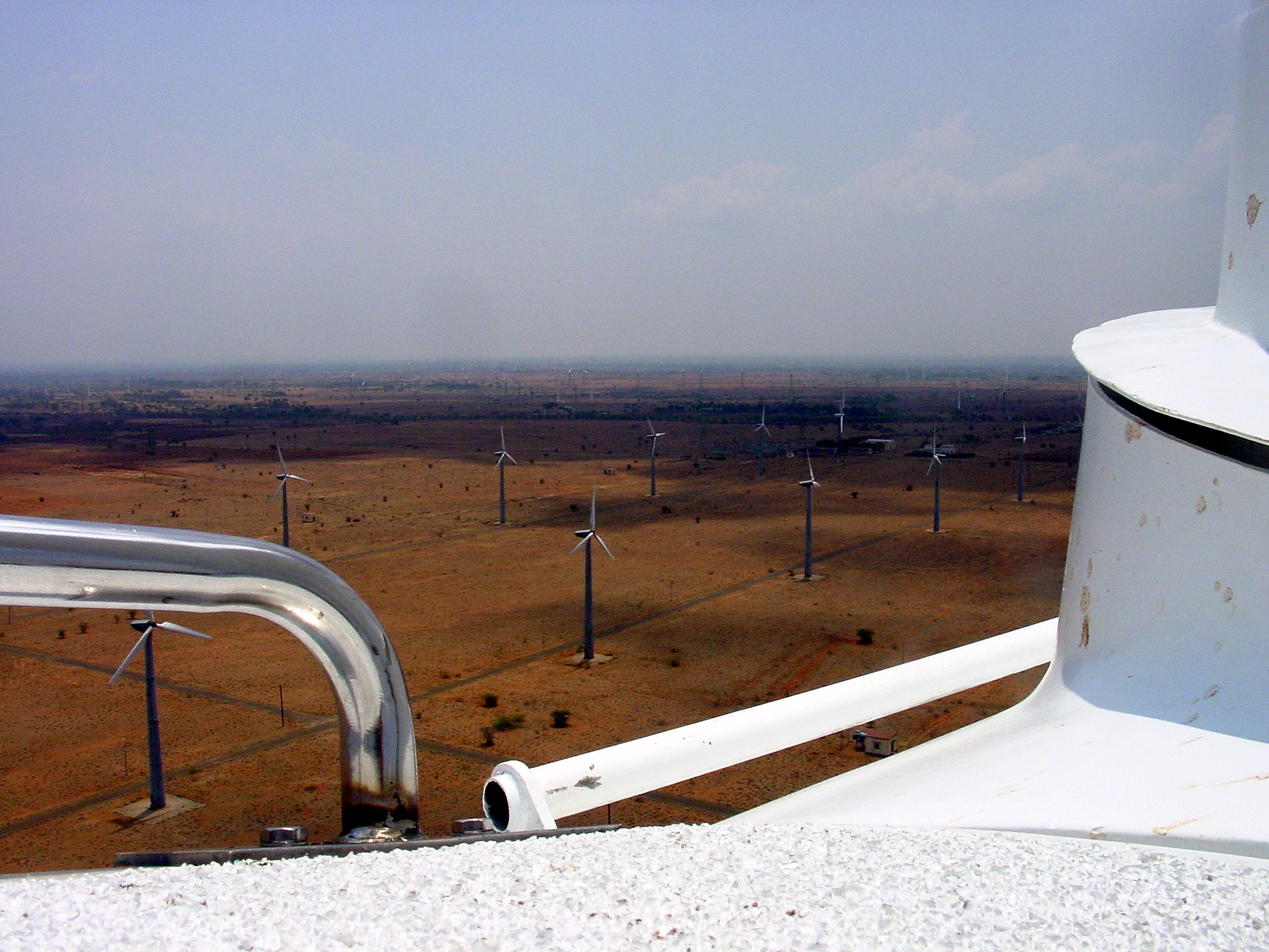 Das Bild wurde vom Dach einer Windkraftanlage aufgenommen und zeigt einen Ausschnitt des Windparks Kayathar im indischen Bundesstaat Tamil Nadu.